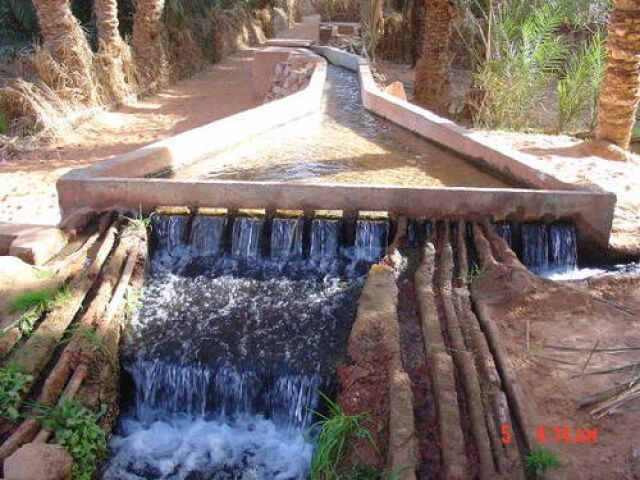 تقسيم الماء